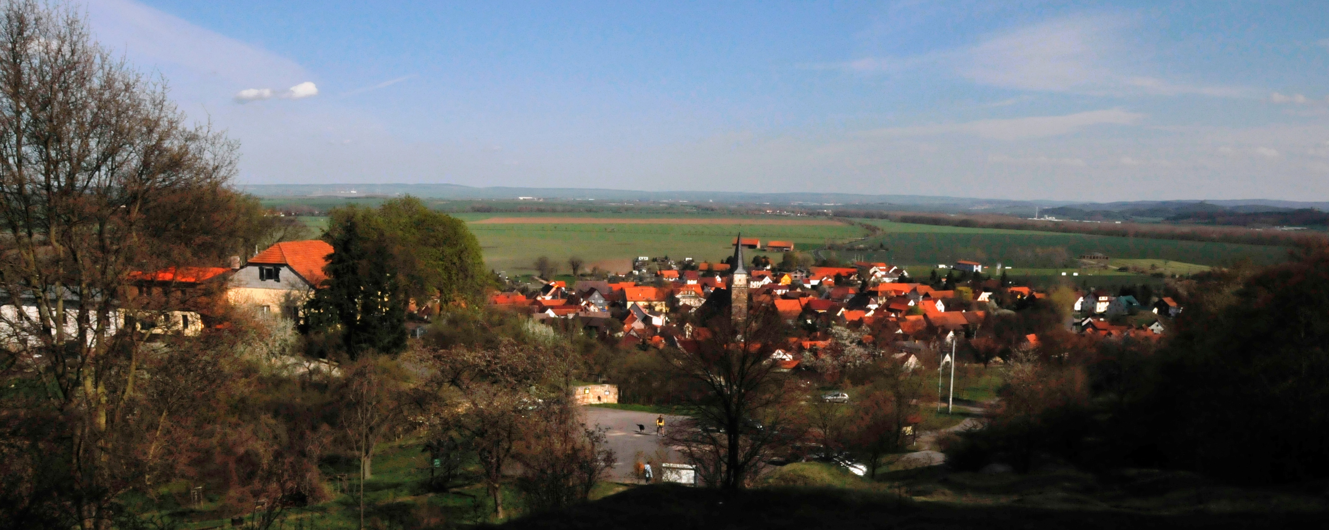 Seebergen vom Löns-Denkmal aus